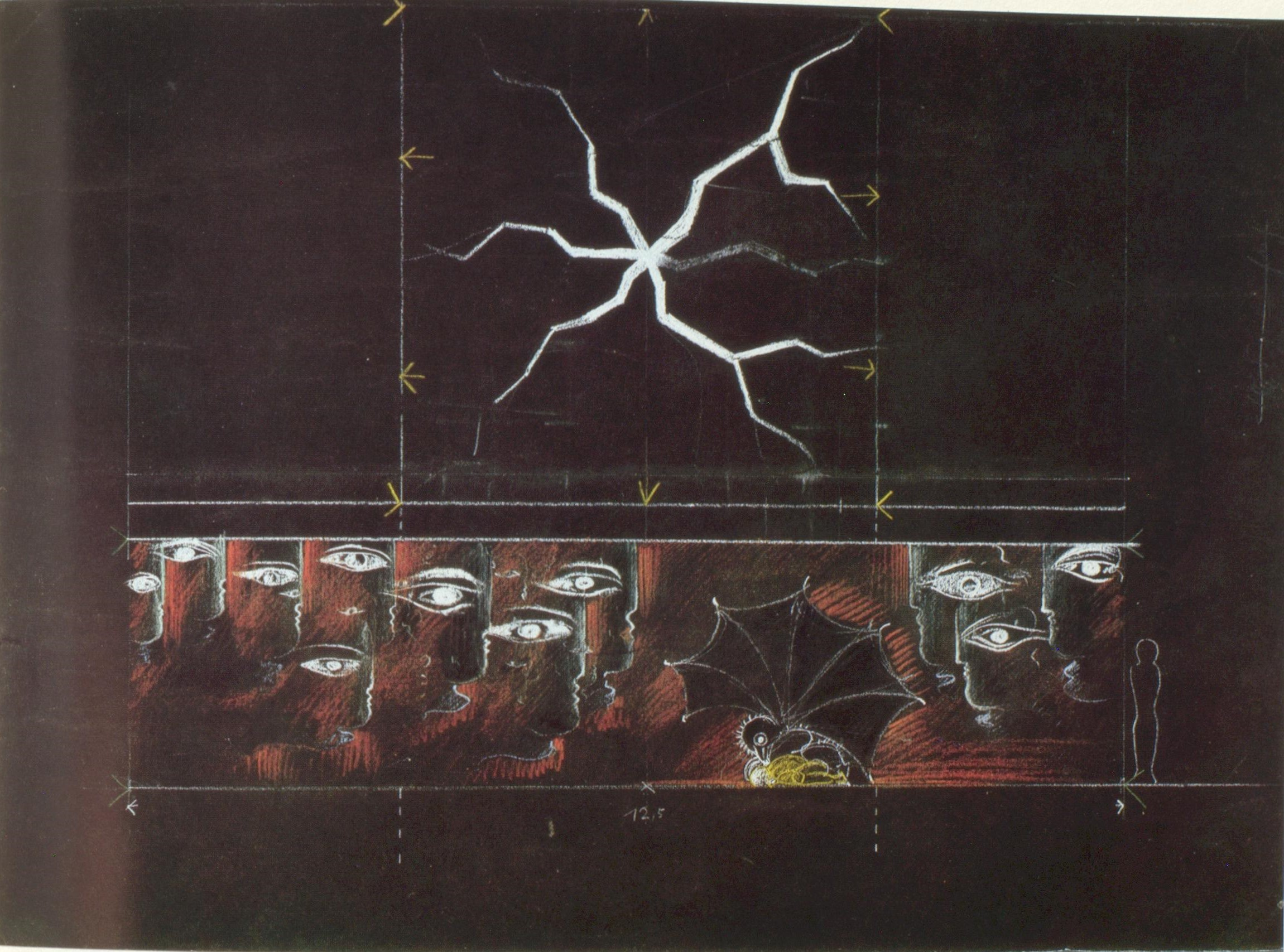 Oskar Schlemmer Bühnenbildentwurf zu Arnold Schönberg Die glückliche Hand 1. Bild Krolloper 1930